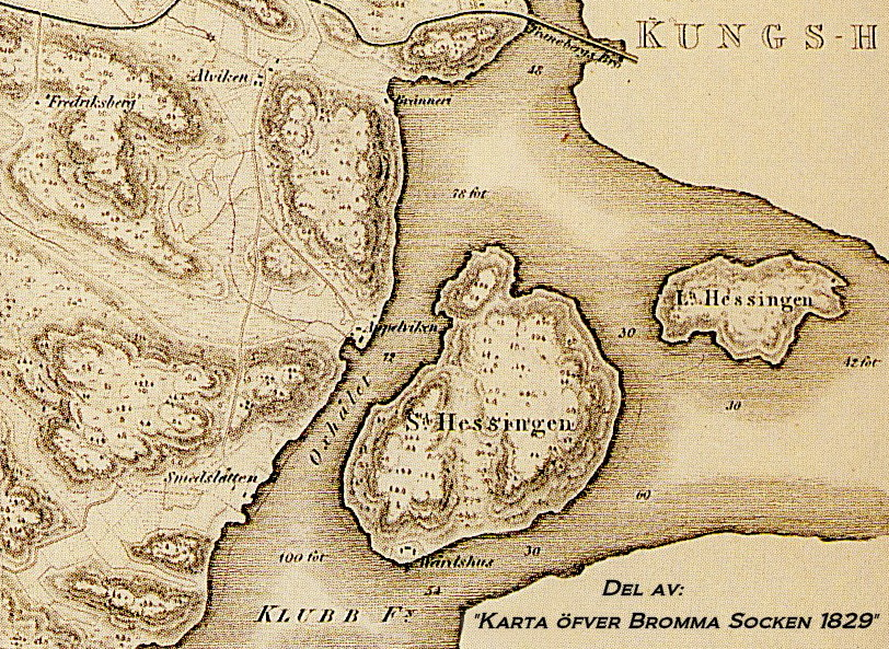 Del av karta: "Karta övfer Bromma Socken uti Stockholms län och Sollentuna härad"